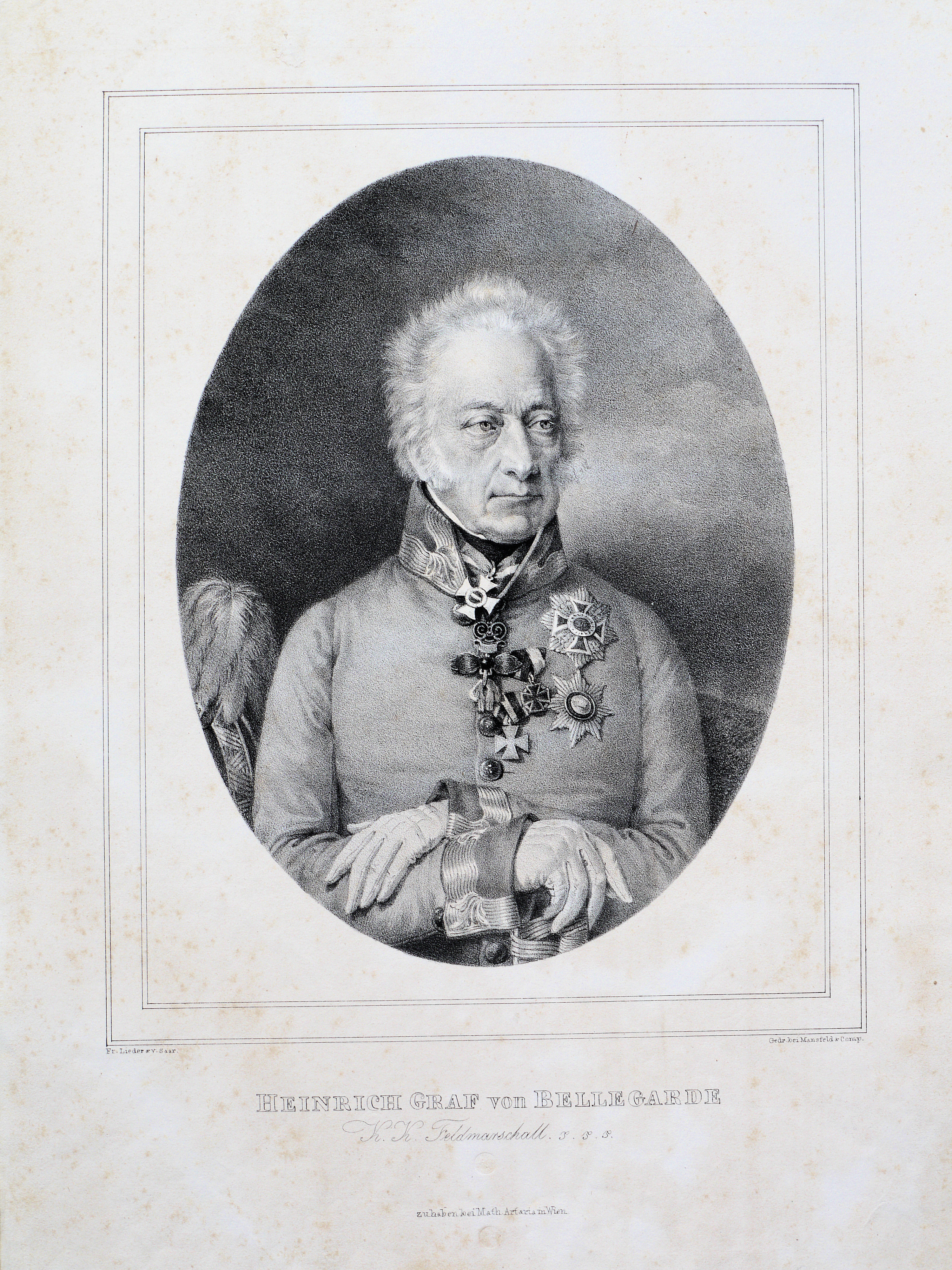 Heinrich Graf von Bellegarde (1757-1845), k. k. Feldmarchall, Minister. Lithographie von Friedrich Lieder und v. Saar, ca 1830